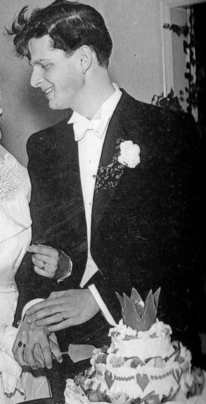 Suomalainen näyttelijä Matti Ranin (1926–2013) hääpäivänään Turun Ruissalon Honkapirtillä vuonna 1950. Rajattu alkuperäisestä kuvasta.